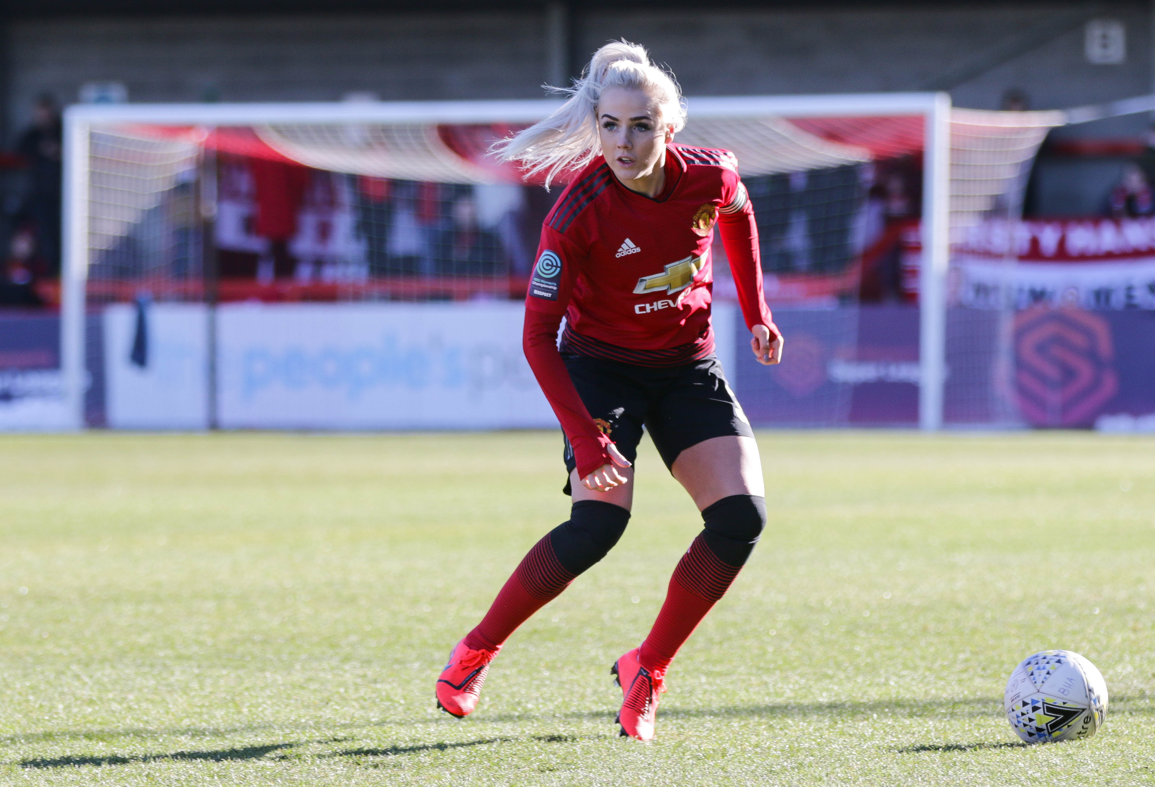 Alex Greenwood